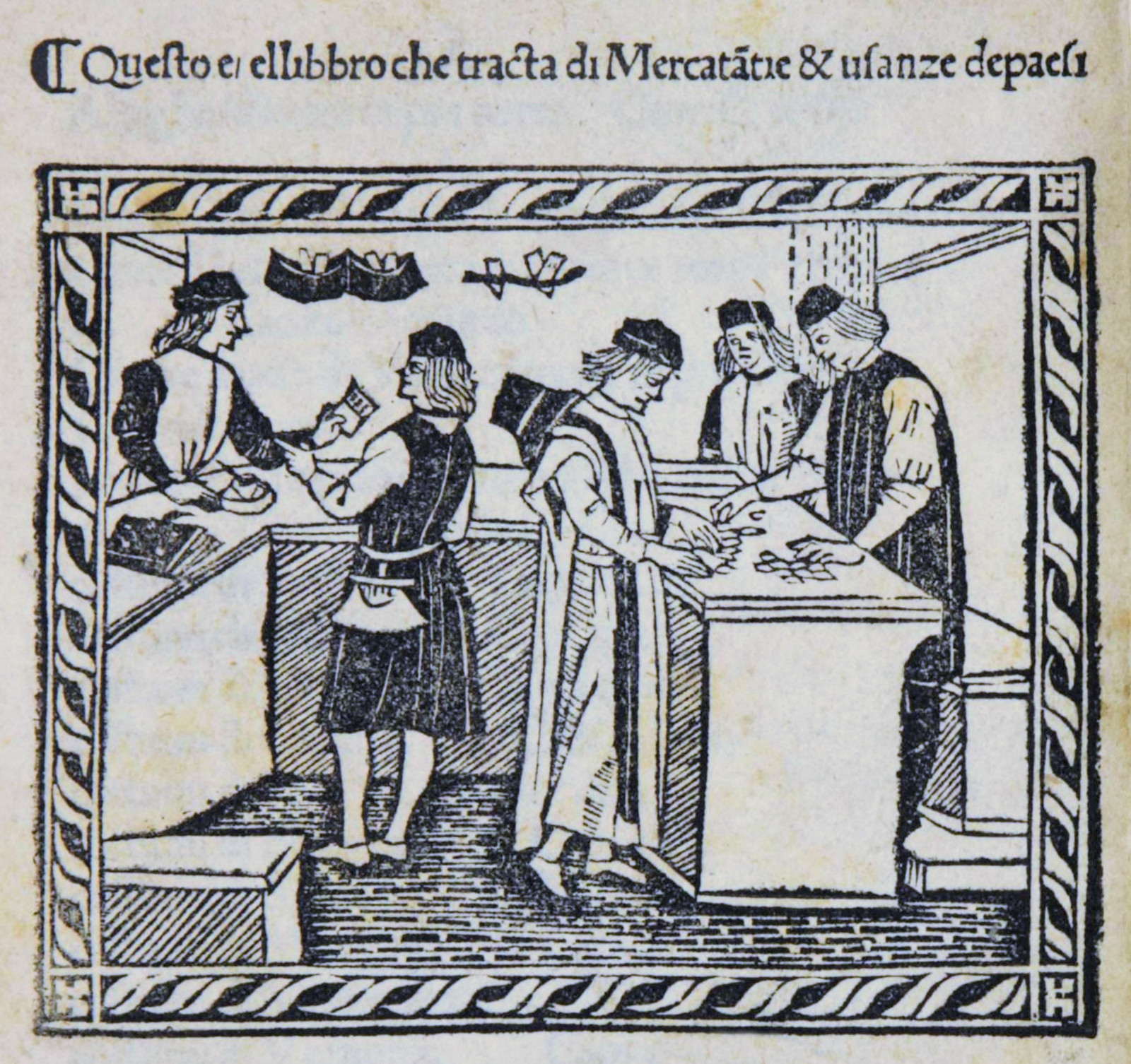 Frontespizio del volume